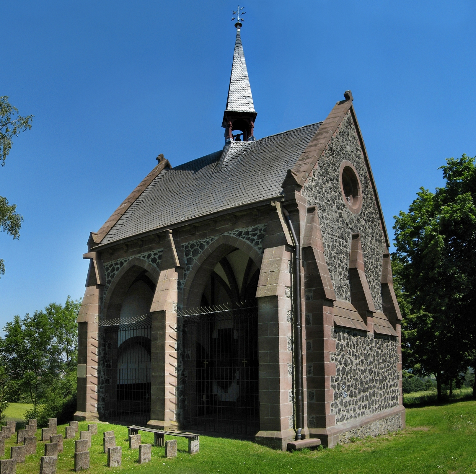 Magdalenen chapel Amöneburg.